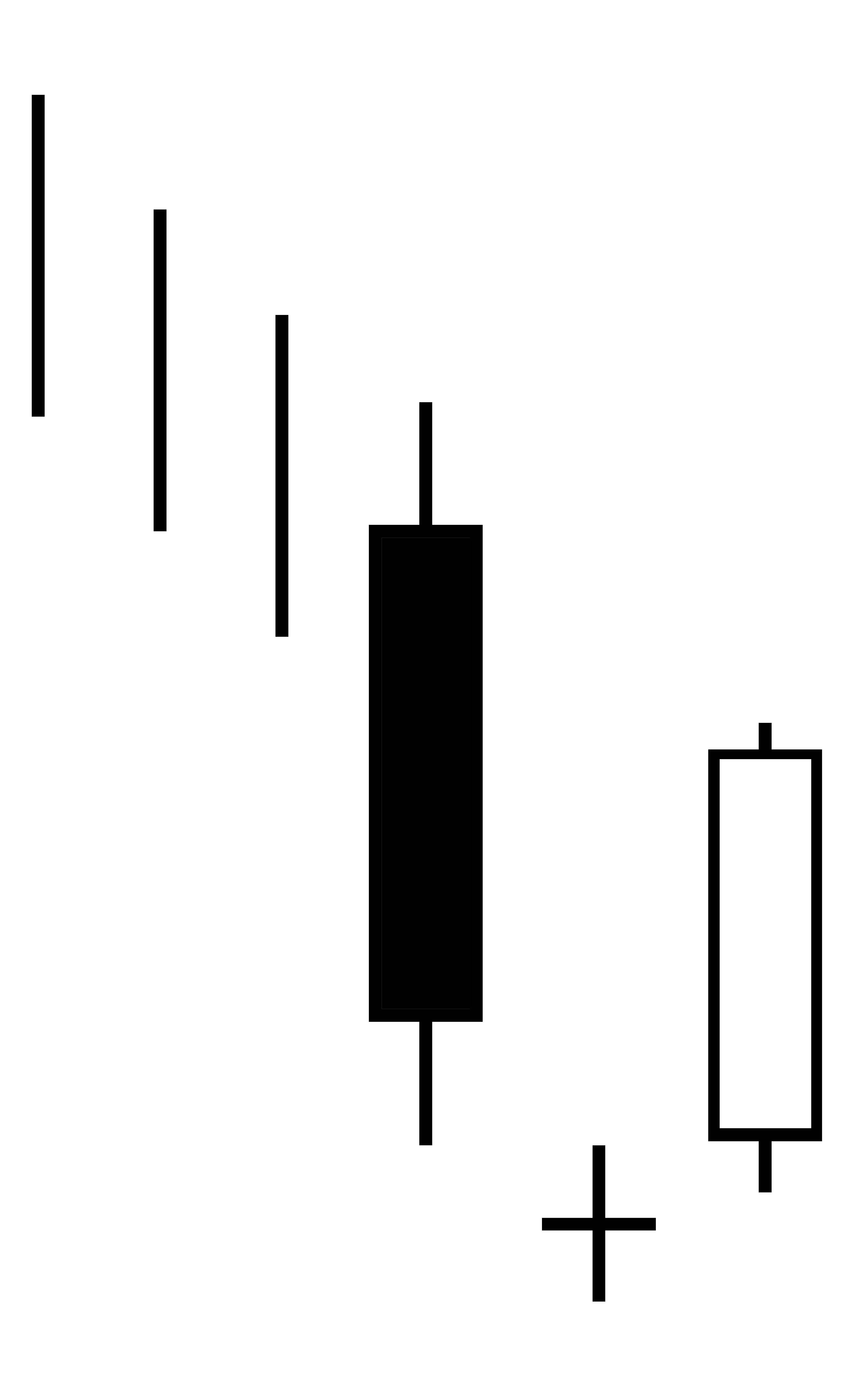 Bullish Morning doji Star